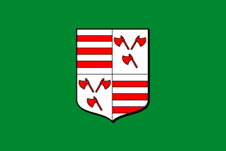 Vlag van de gemeente Bever